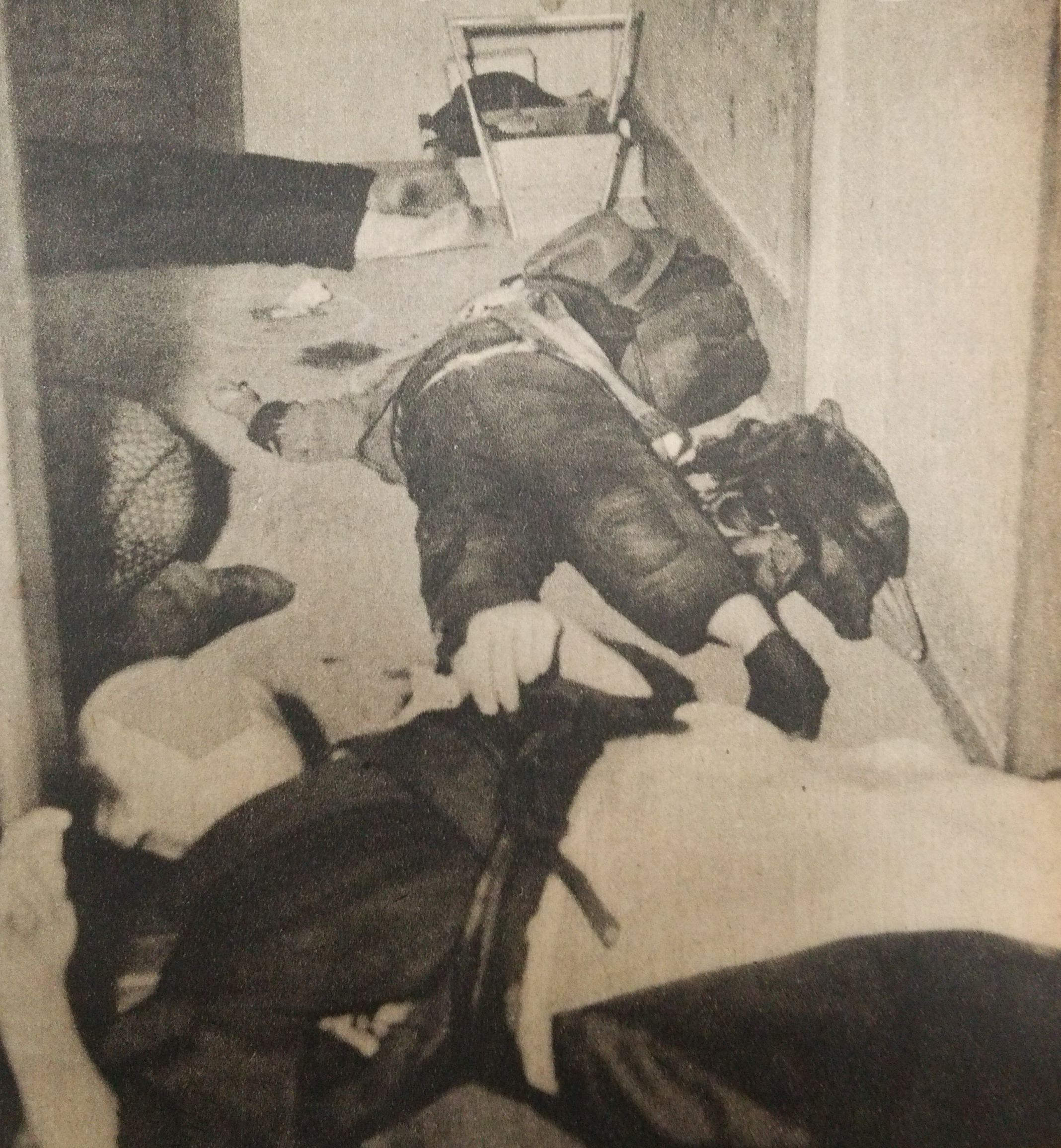 帝銀事件の現場